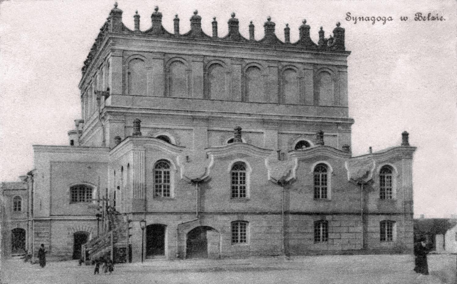 Большая синагога в Белзе в начале XX в.